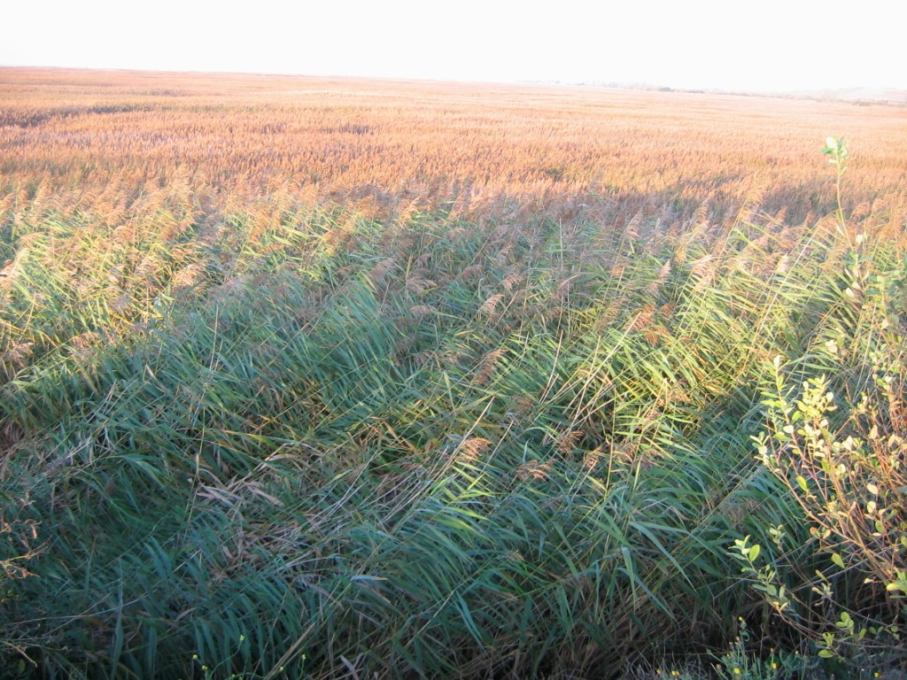 Roselière dans l'estuaire de la Seine, près du Havre, Seine-Maritime